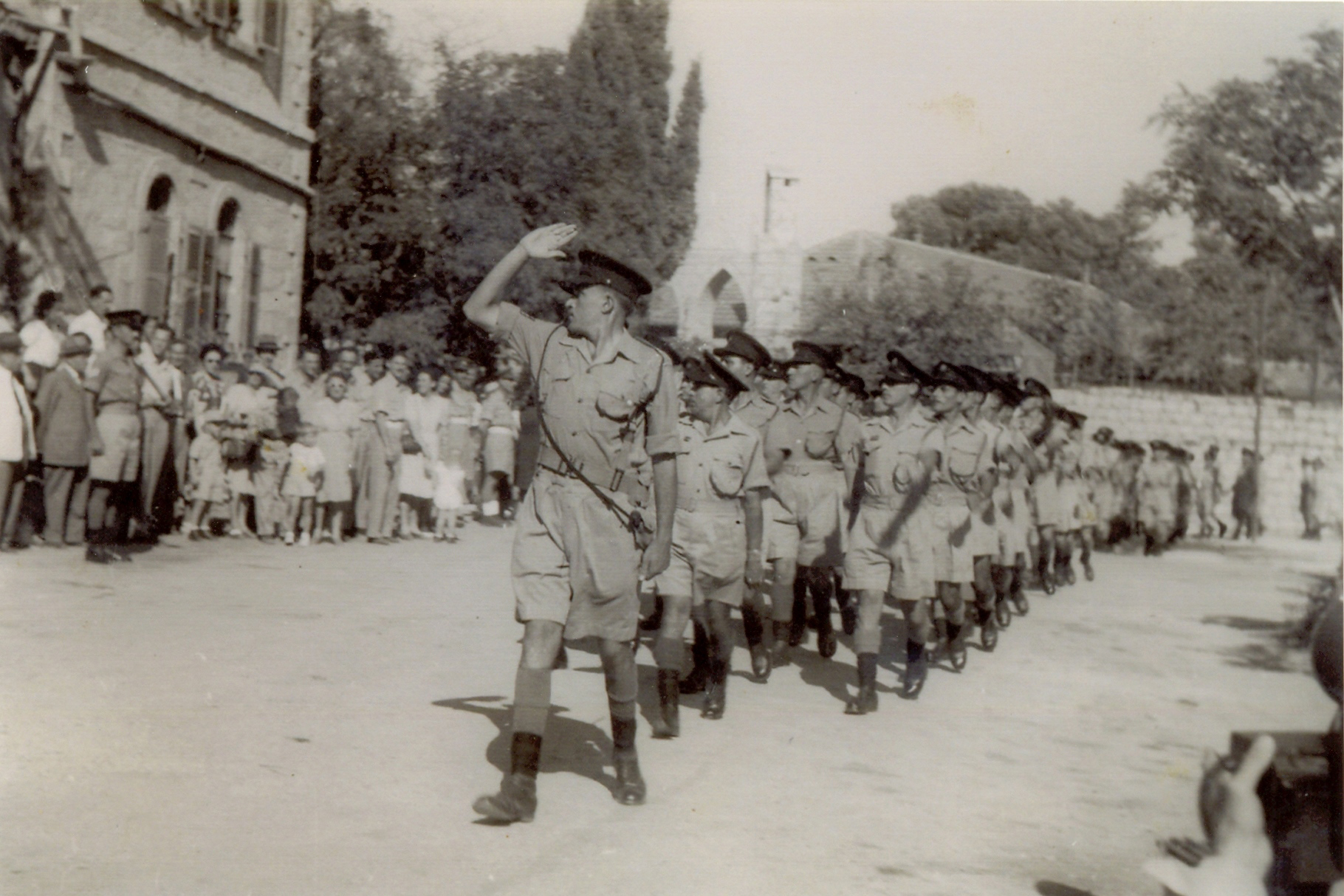 מצעד שוטרי משטרת ירושלים ברחבה שבחזית בית הדגל, במהלך טקס שבועת האמונים למשטרת ישראל. בראש המצעד הסמל חיים תבורי, לימים המפכ"ל השישי של משטרת ישראל.